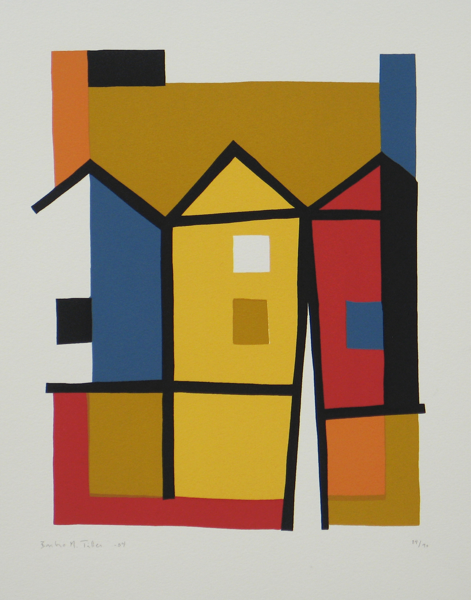 Barbro Maria Tiller - "Tre hus 2", silketrykk, serigrafi 2004 32 x 26 cm